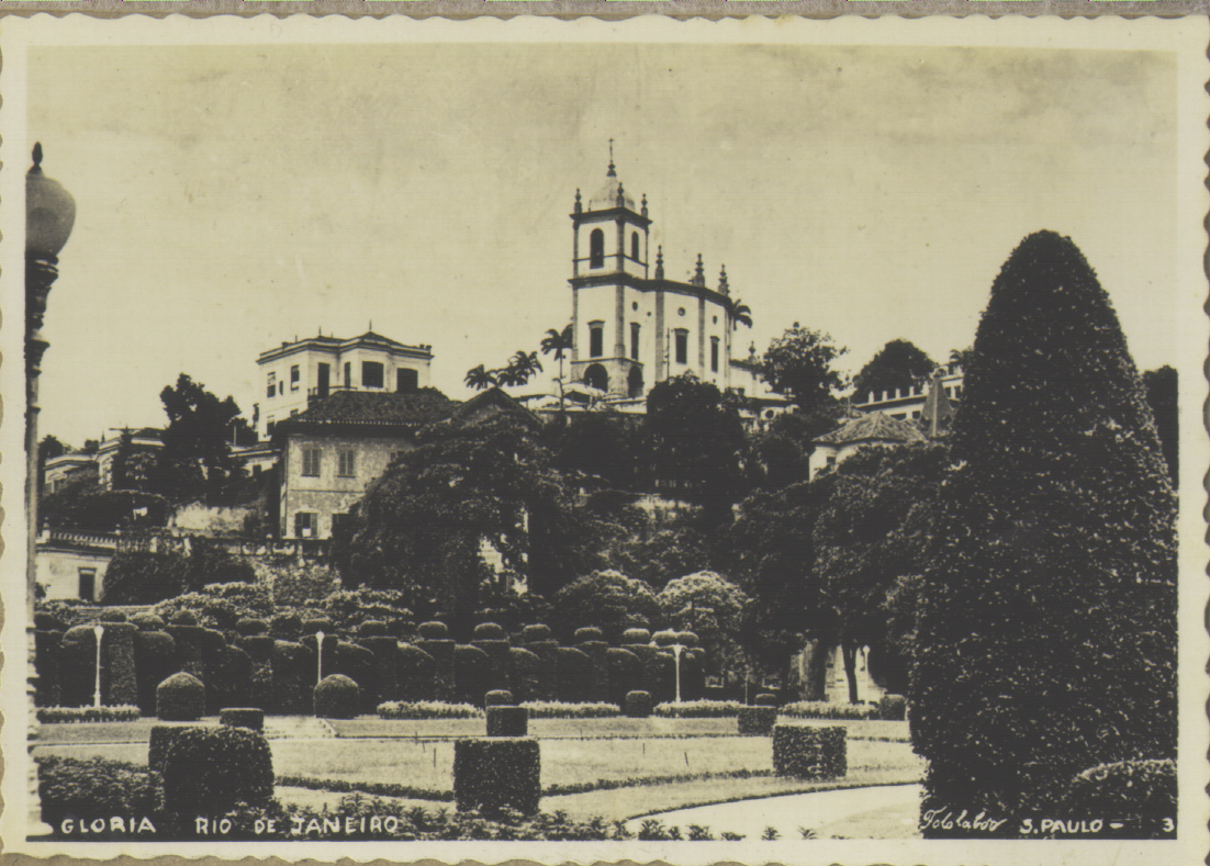 Obra que integra o acervo do Museu Paulista da USP. Coleção Werner Haberkorn